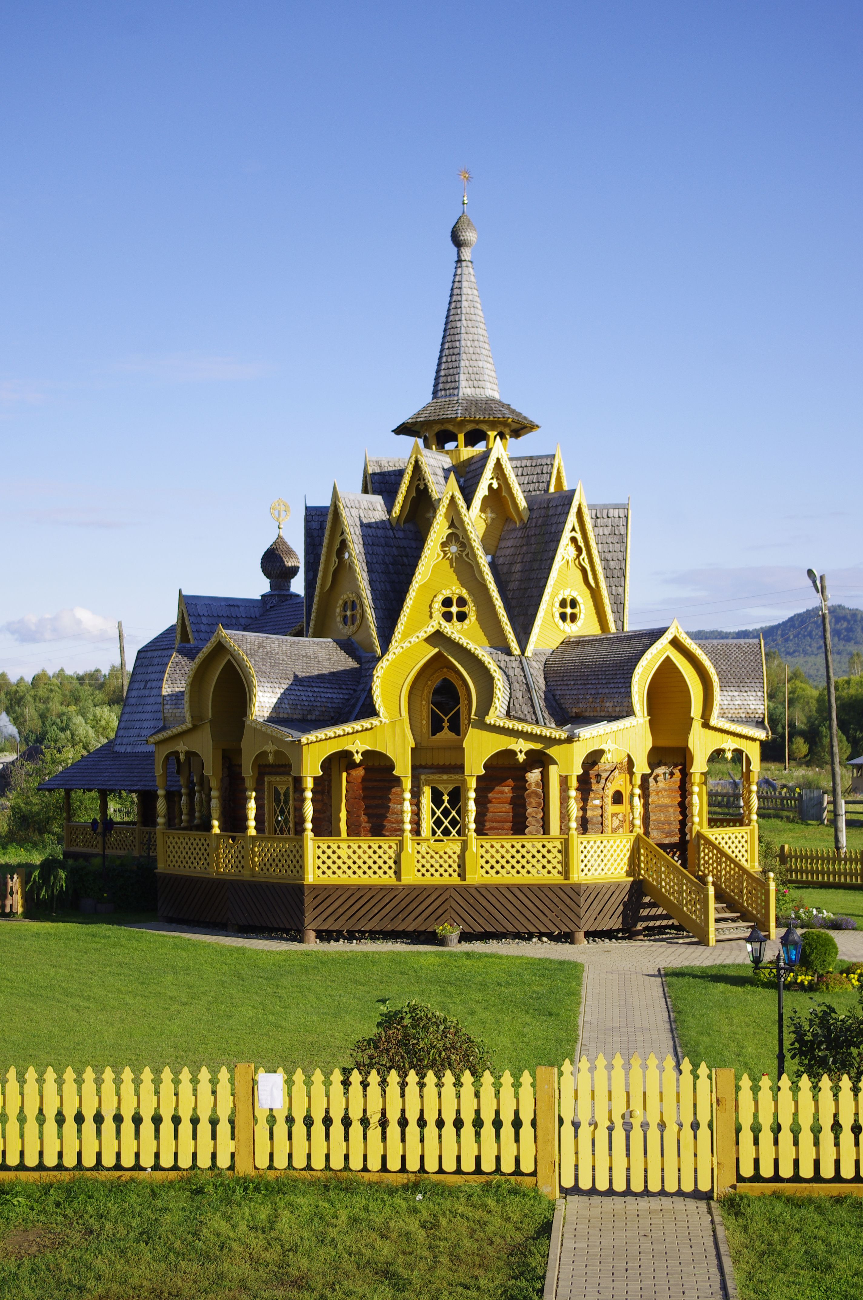 Pietropawłowka, lato 2013.